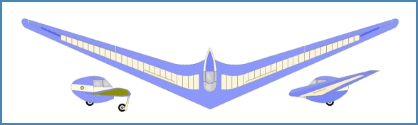 Horten IaE34m